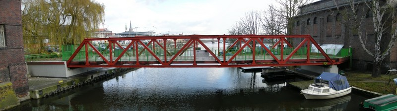 Most Kablowy nad kanałem Odry Zachodniej pomiędzy lewobrzeżną częścią Szczecina a Wyspą Jaskółczą